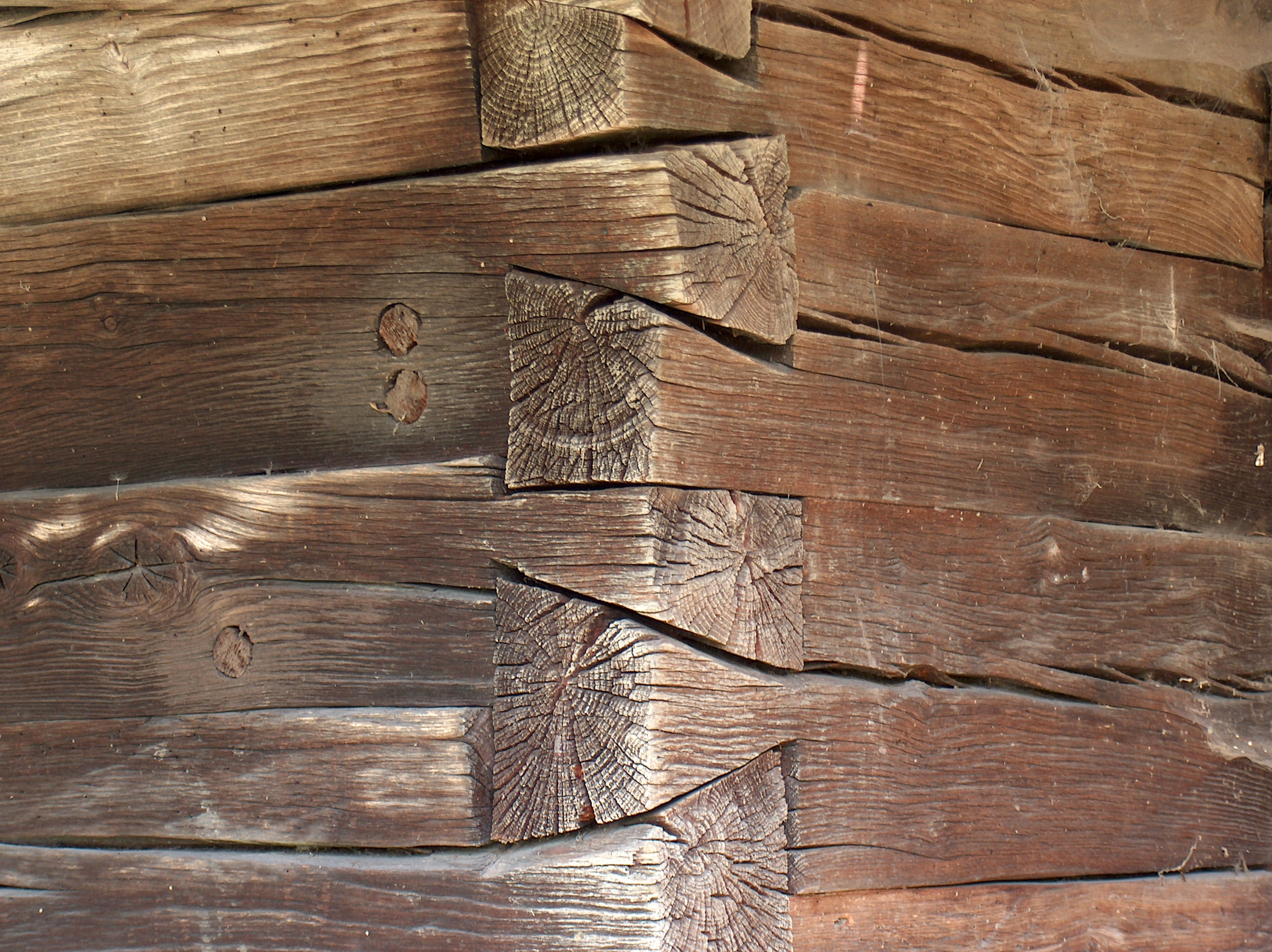 Biserica de lemn din Gersa, comuna Rebrişoara, judeţul Bistriţa Năsăud. Îmbinare.